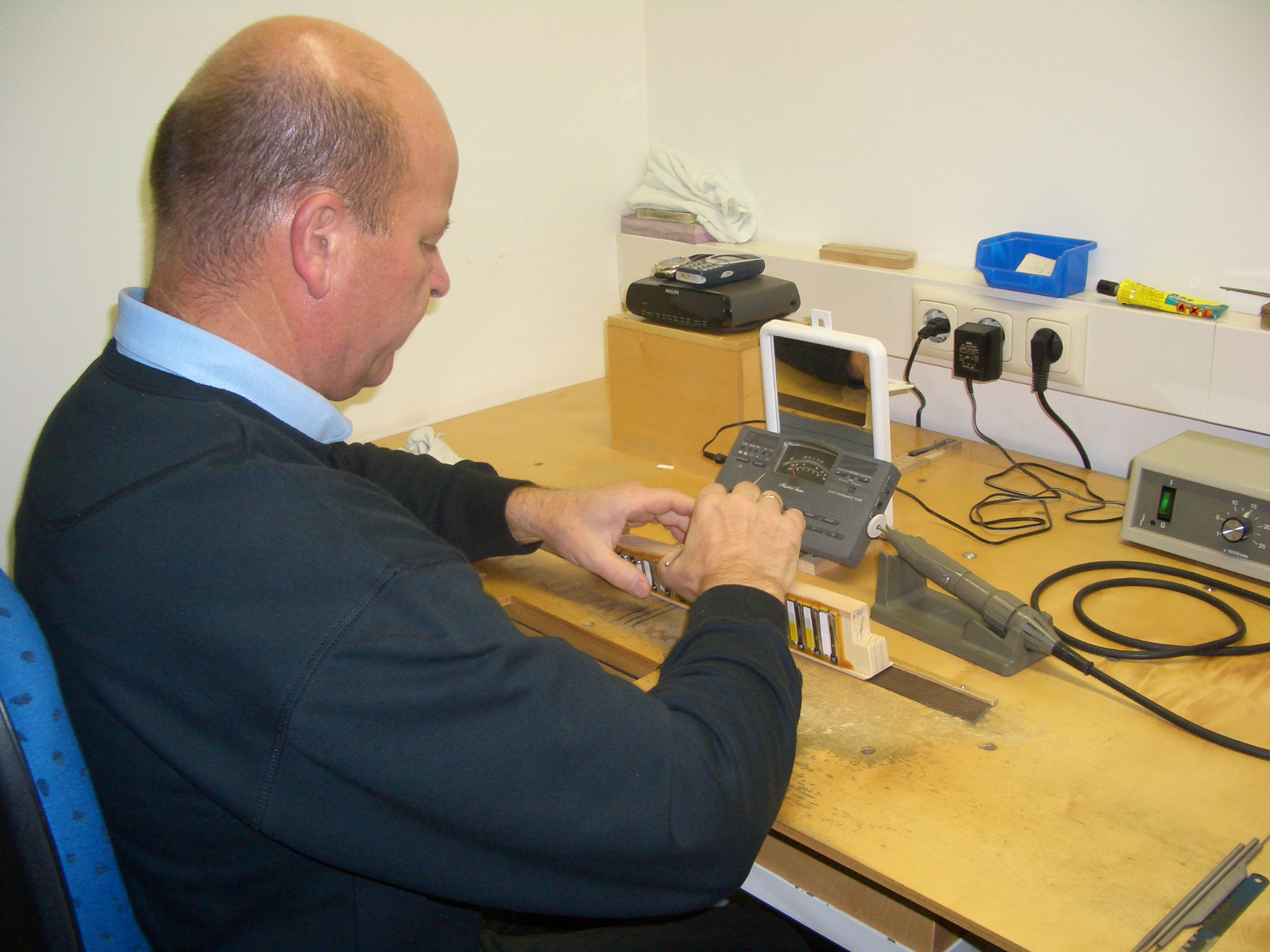 Müller-Werksführung